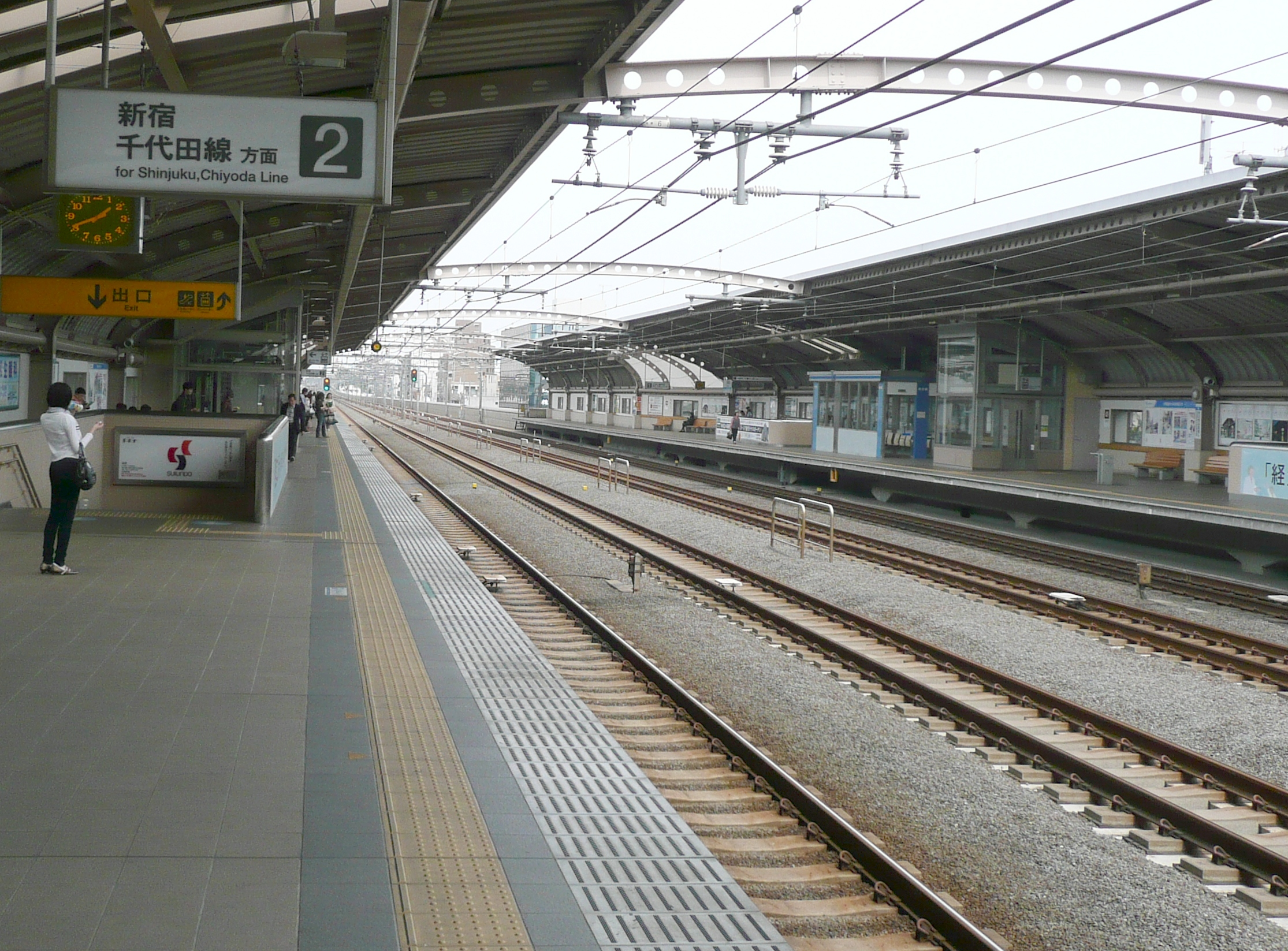 千歳船橋駅ホーム